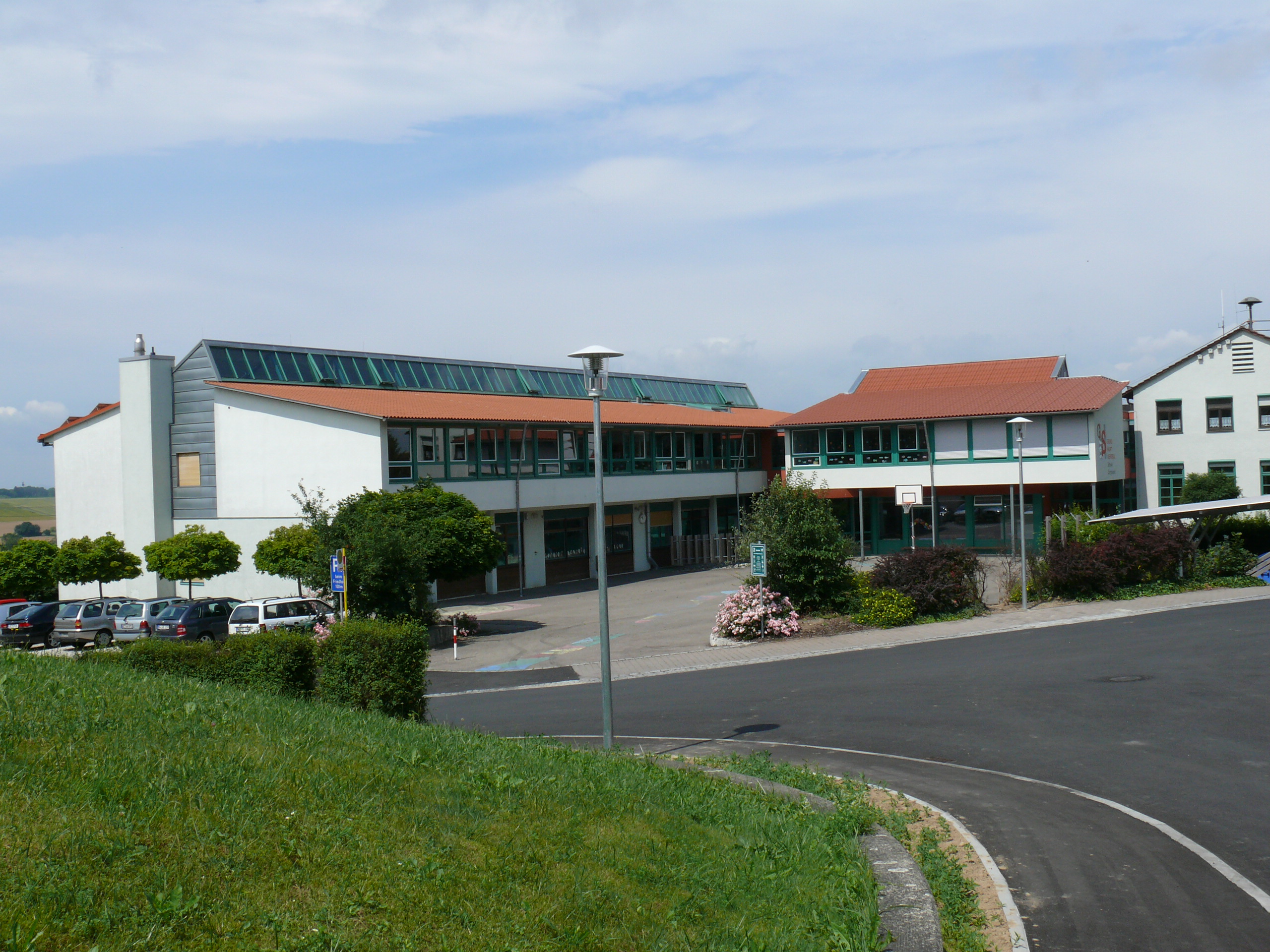 Schule Burgrieden aus Nord-Ost (von der Kirchstraße) gesehen.